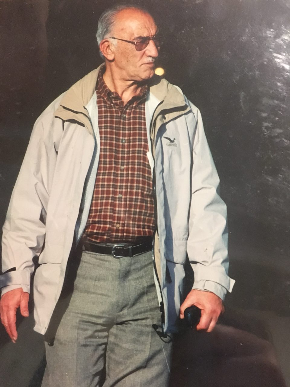 محمد رنجبر (رئیس) در اولین روزهای بازگشت به تهران و تیم ملی